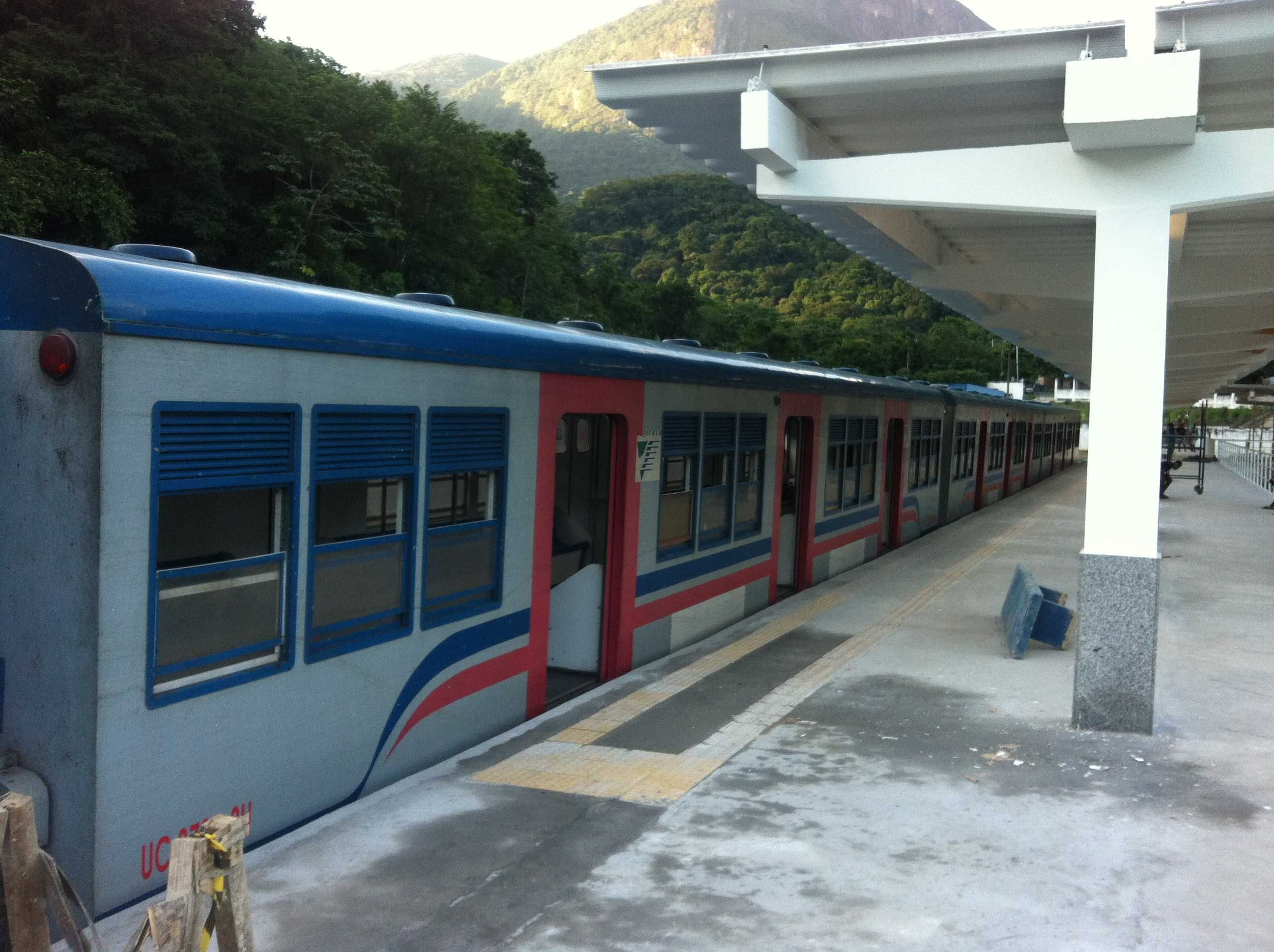 SUPERVIA Estação de Vila Inhomirim ( Raiz da Serra )